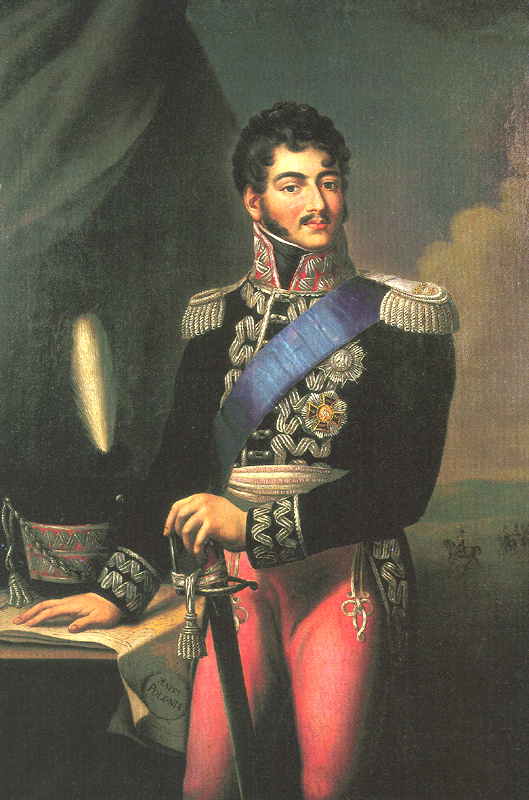 prince Joseph Poniatowski